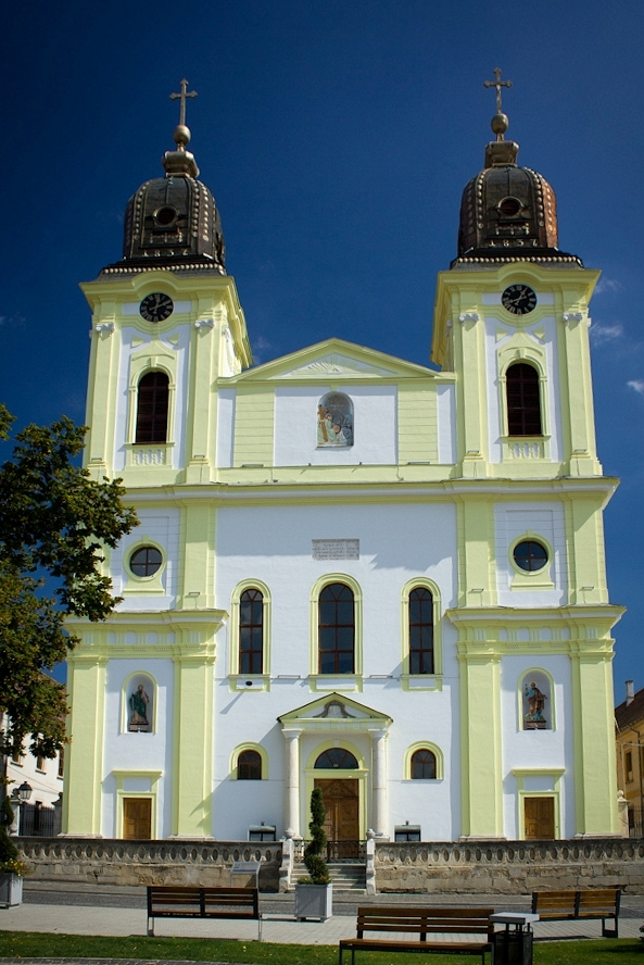 Catedrala greco-catolică "Sf. Treime"